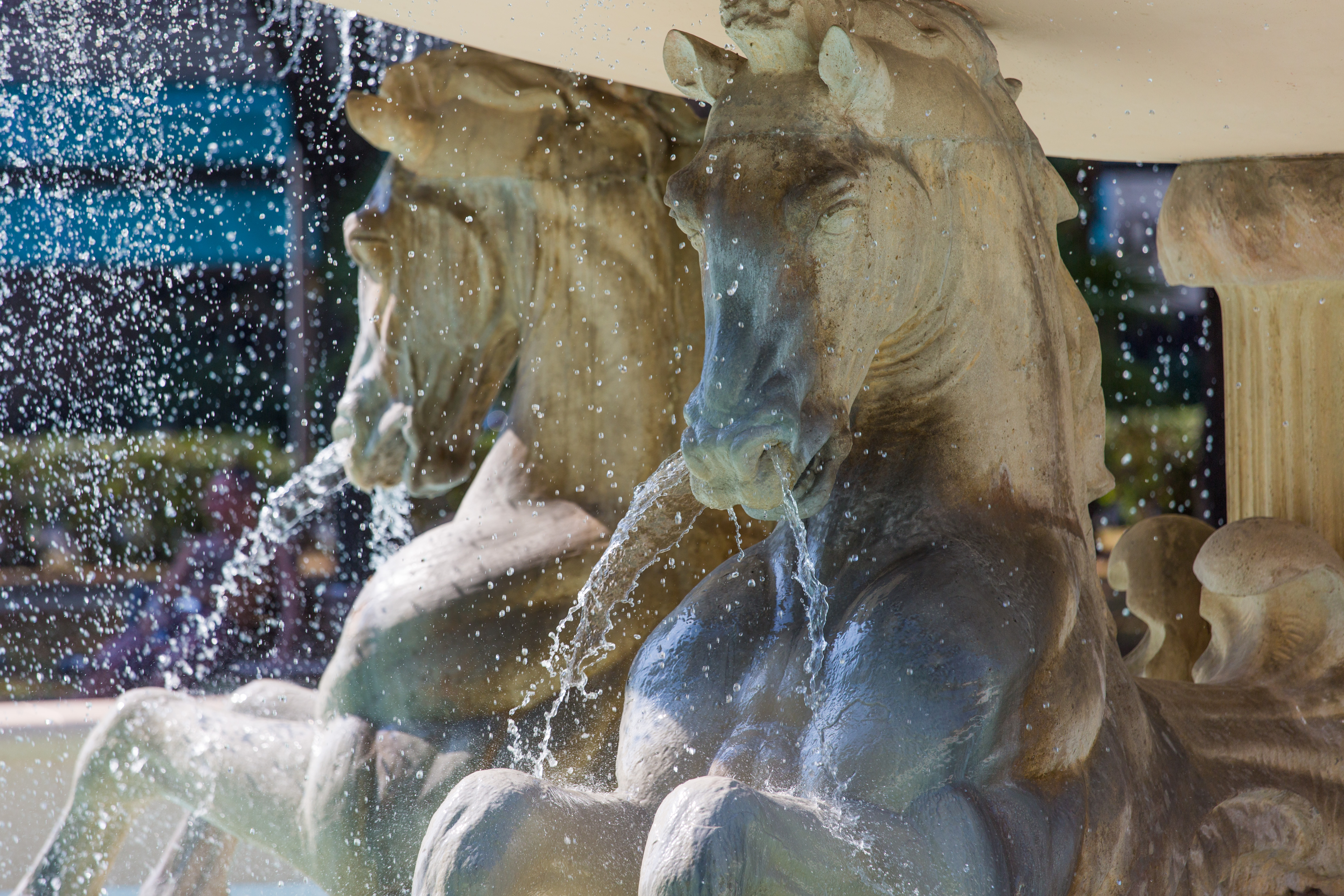 Fontana dei 4 cavalli This is a photo of a monument which is part of cultural heritage of Italy.